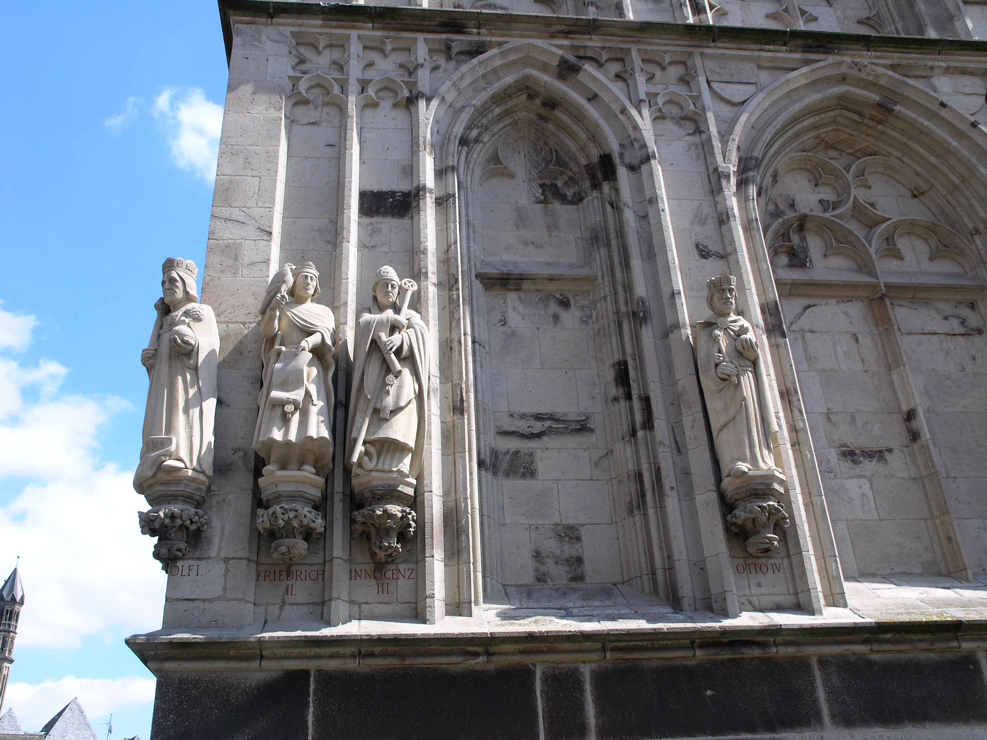 Северный Рейн-Вестфалия, Кёльн - ратуша